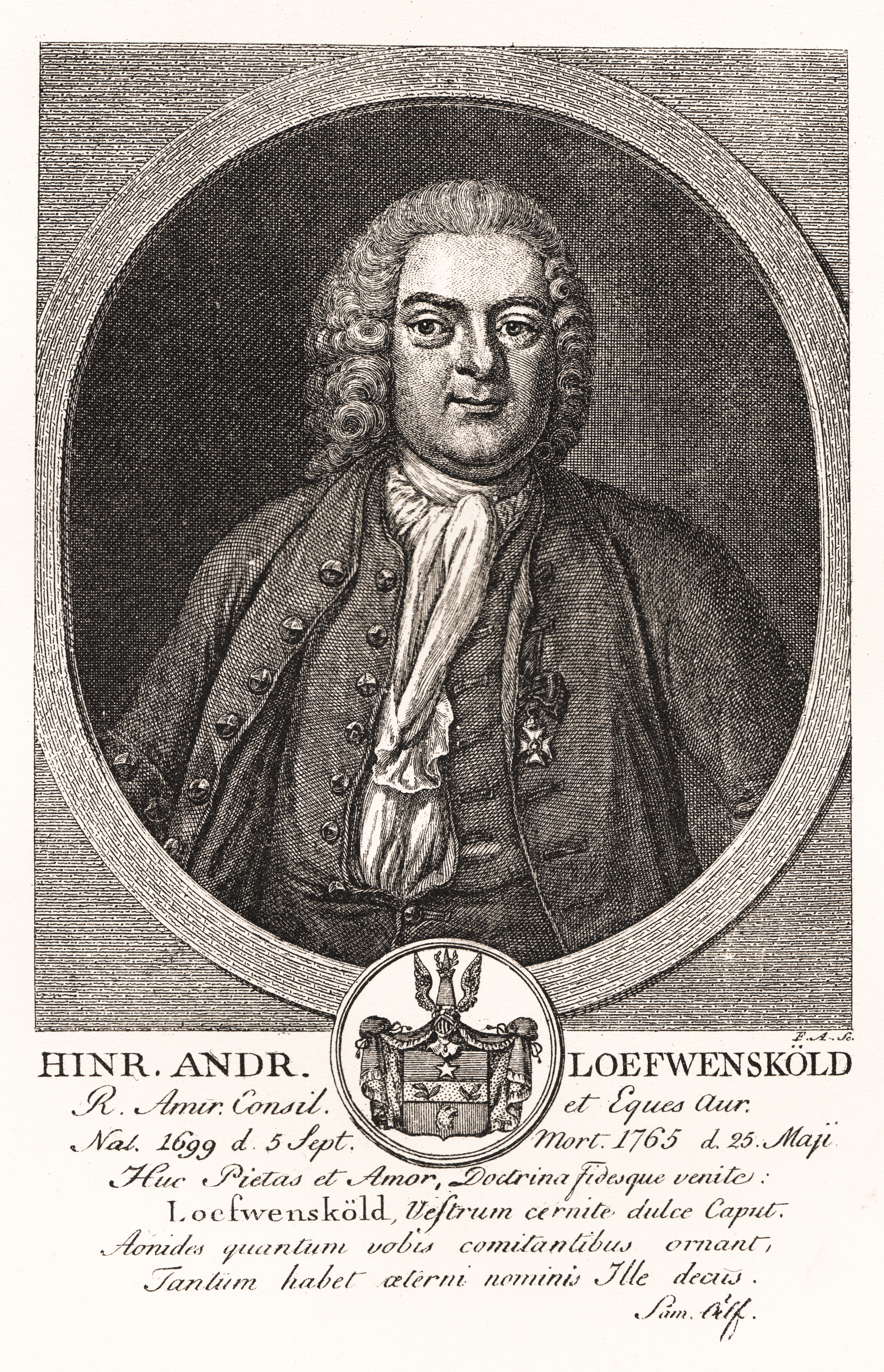 Henrik Anders Löfvenskiöld (1699-1765).